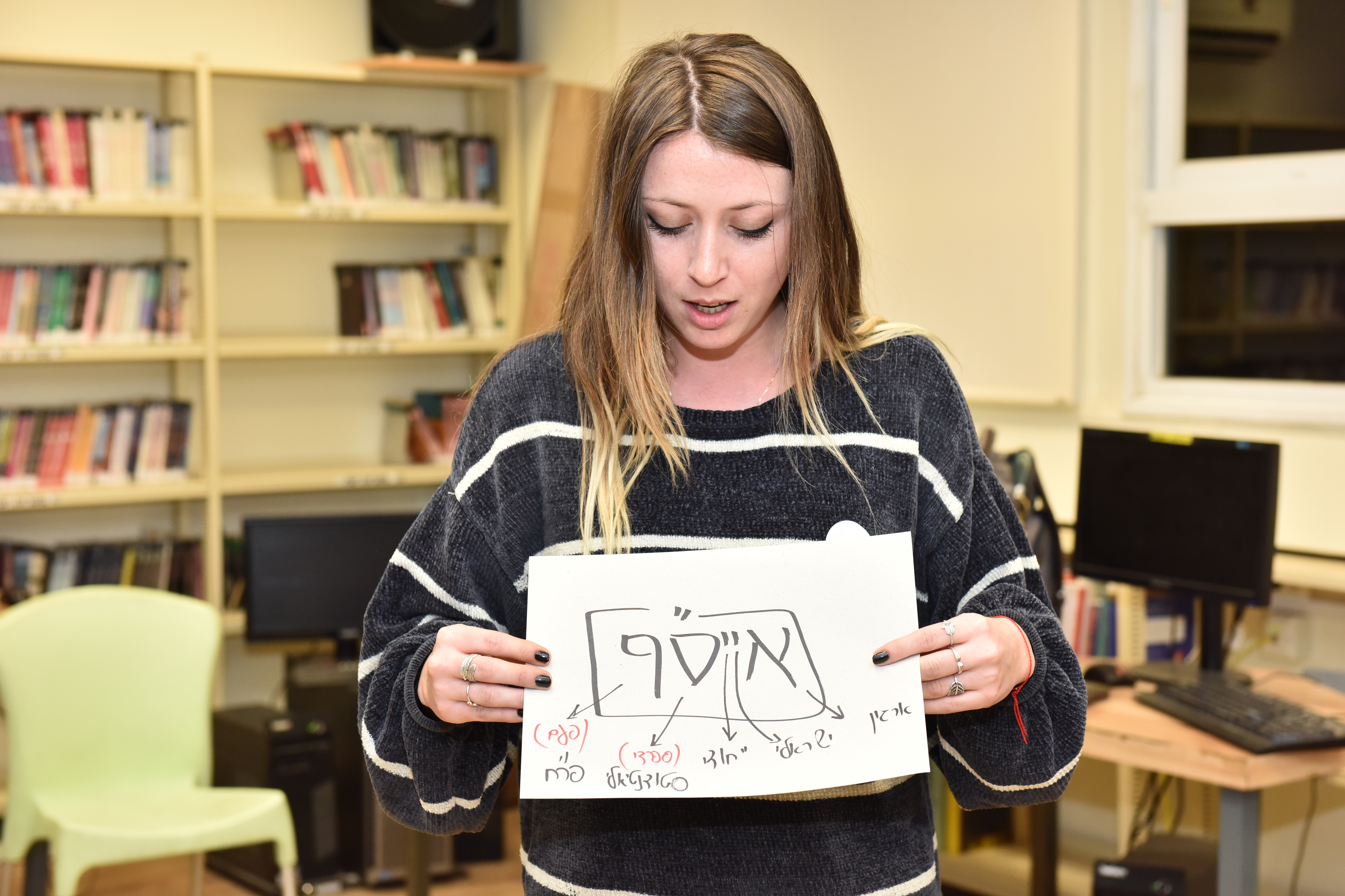 סטודנטית חונכת תלמידה בפרויקט גשר לאקדמיה צילום ברכה ג'ורנו